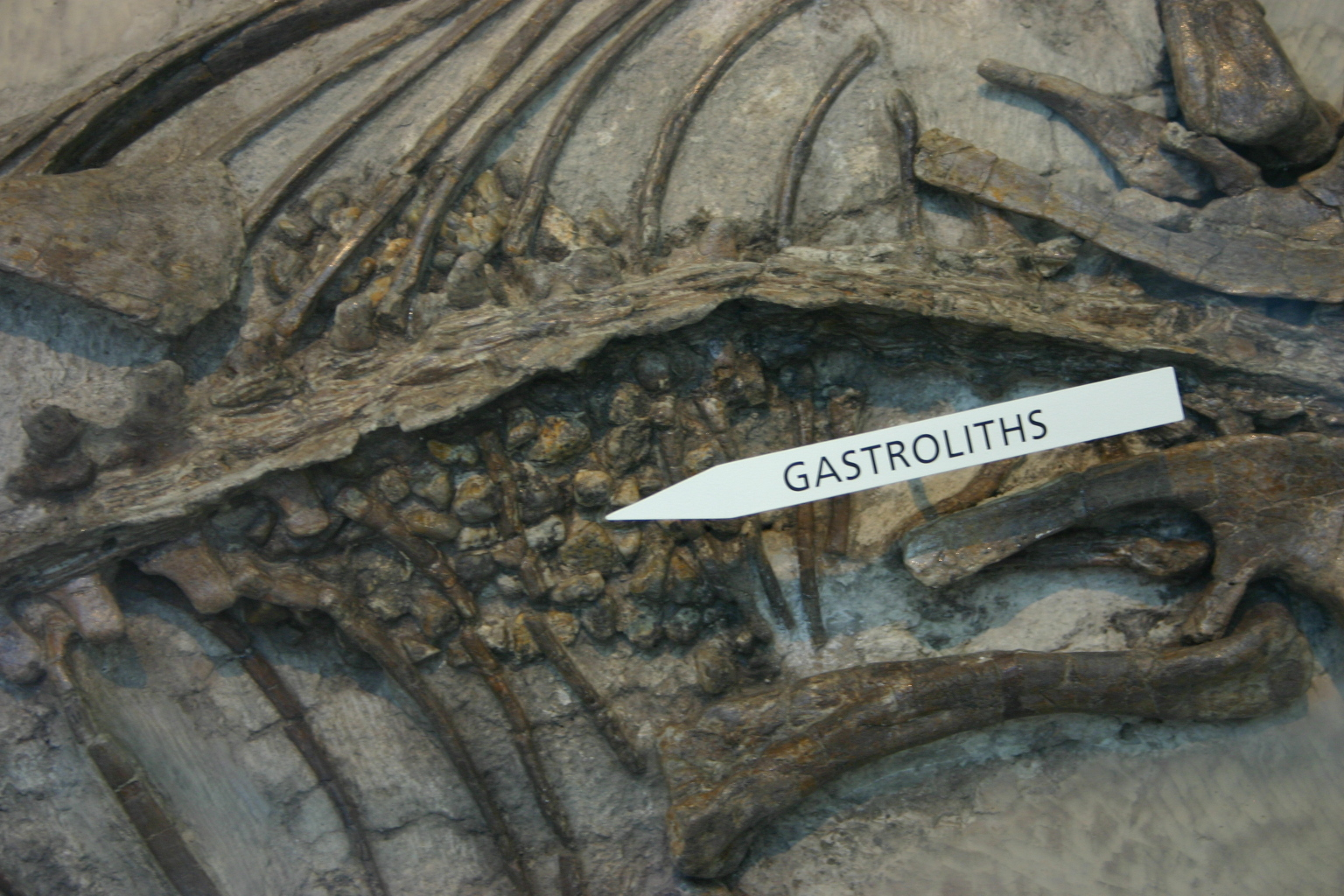 Psittacosaurus gastroliths